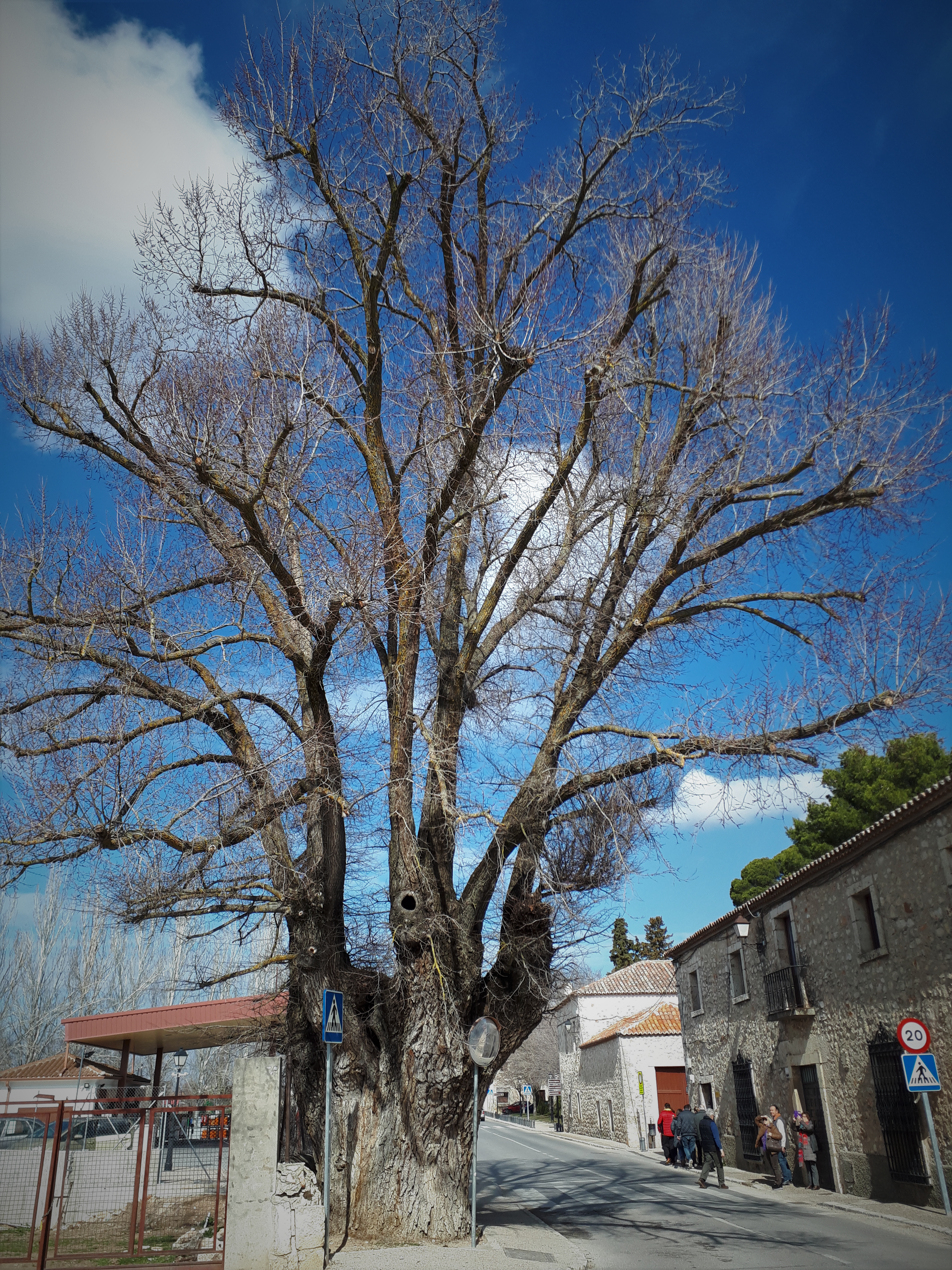 Olmo de Nuevo Baztán. Ulmus minor catalogado, desde 1992, como Árbol Singular de la Comunidad de Madrid (España).